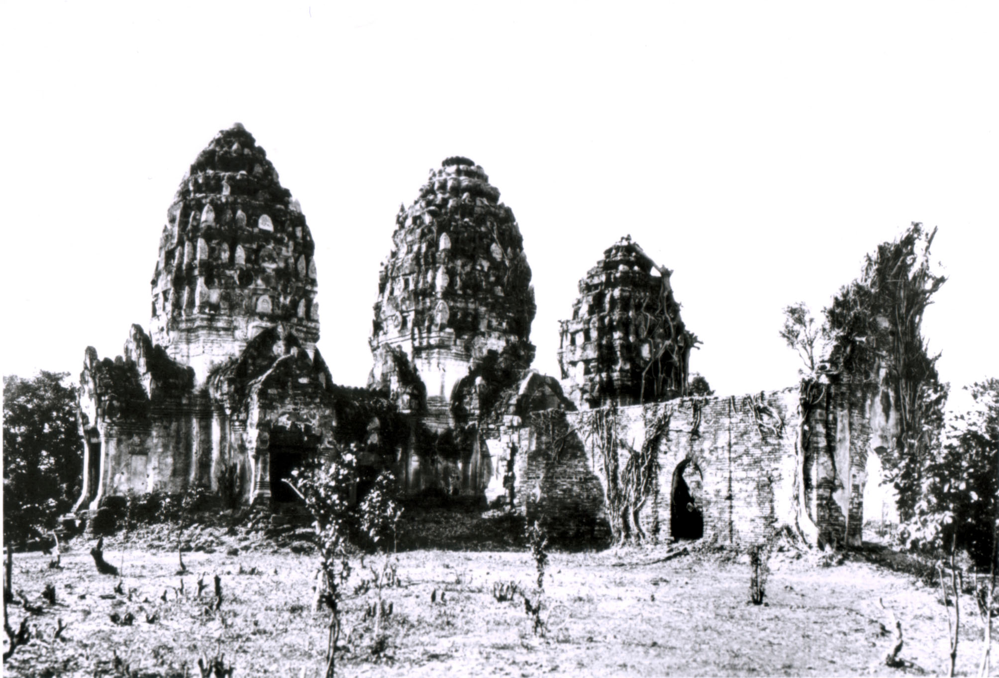 Lopburi ลพบุรี ประมาณปี 2501 ภาพเก่า